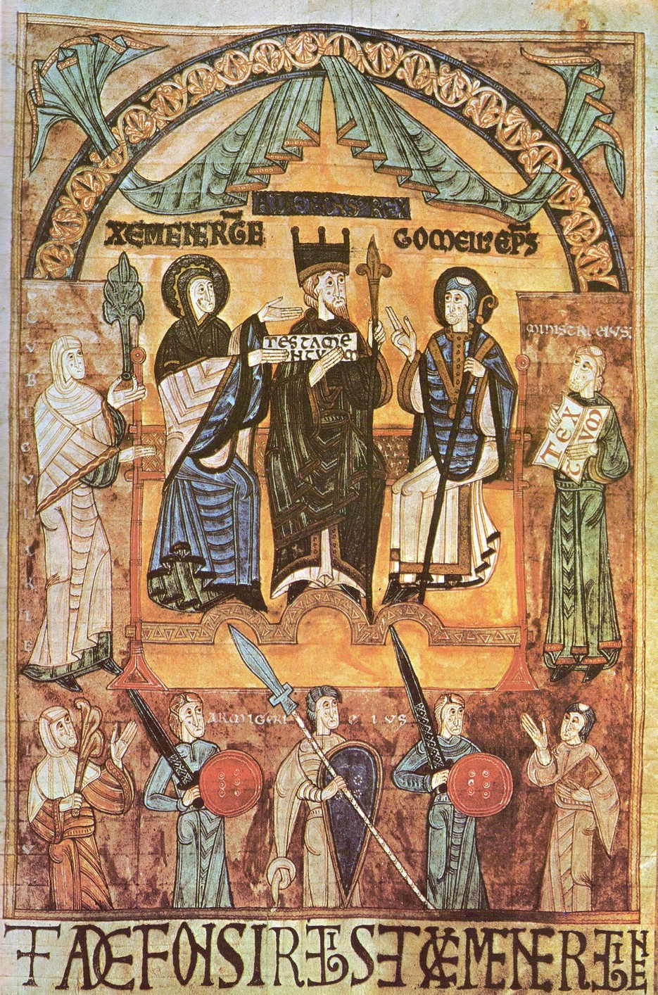 Libro de los Testamentos